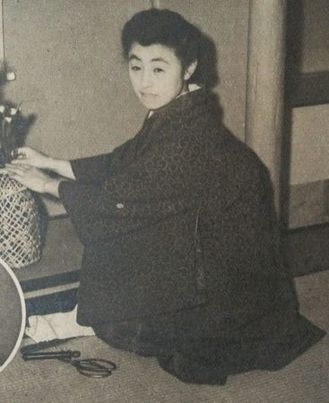 村上八重（宇野浩二の内妻）